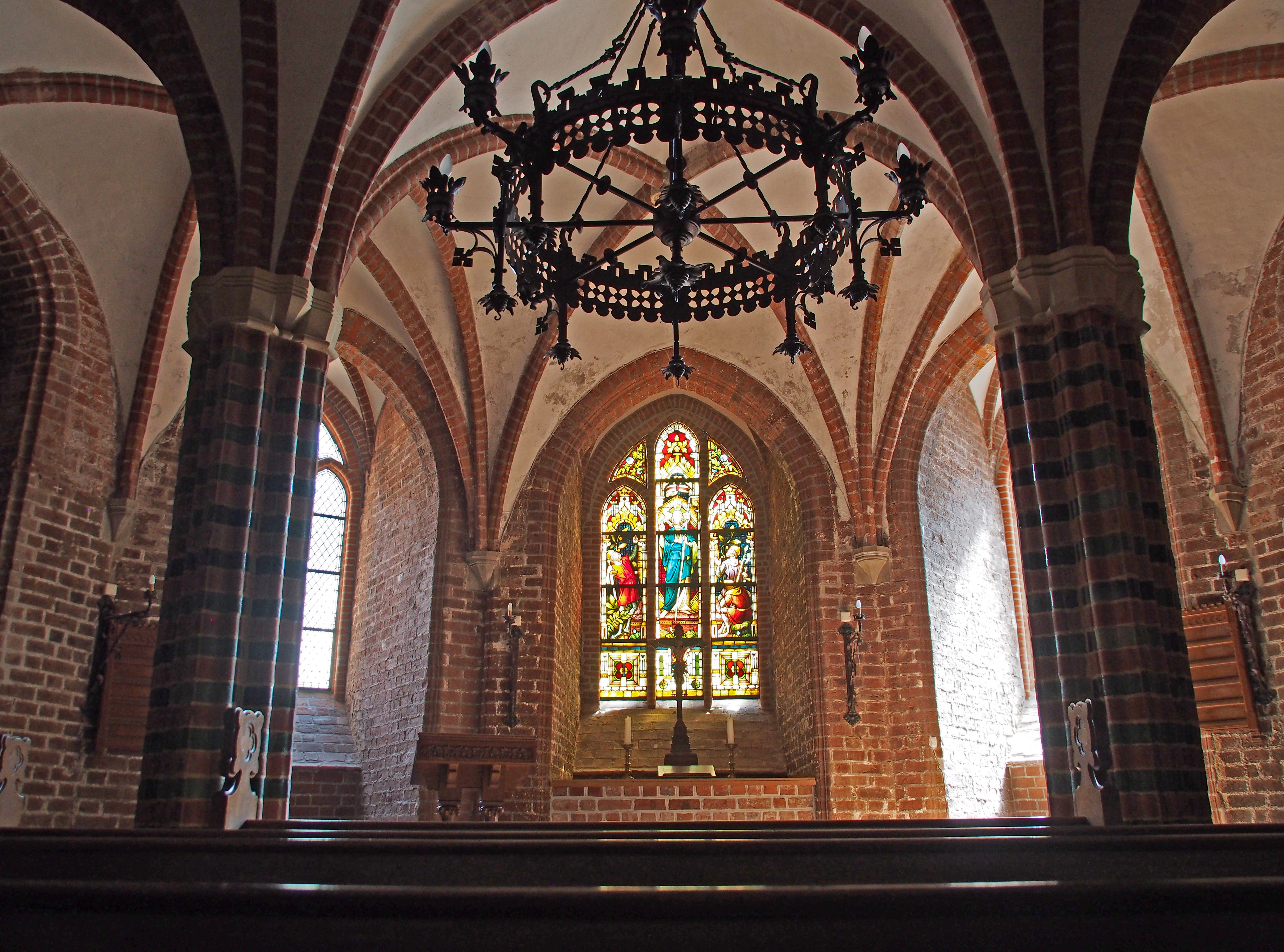 Unterkirche St. Michaelis, Lüneburg